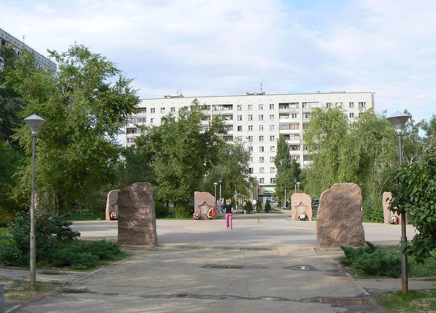 Центральный мемориал парка памяти воинам-афганцам в Волгограде